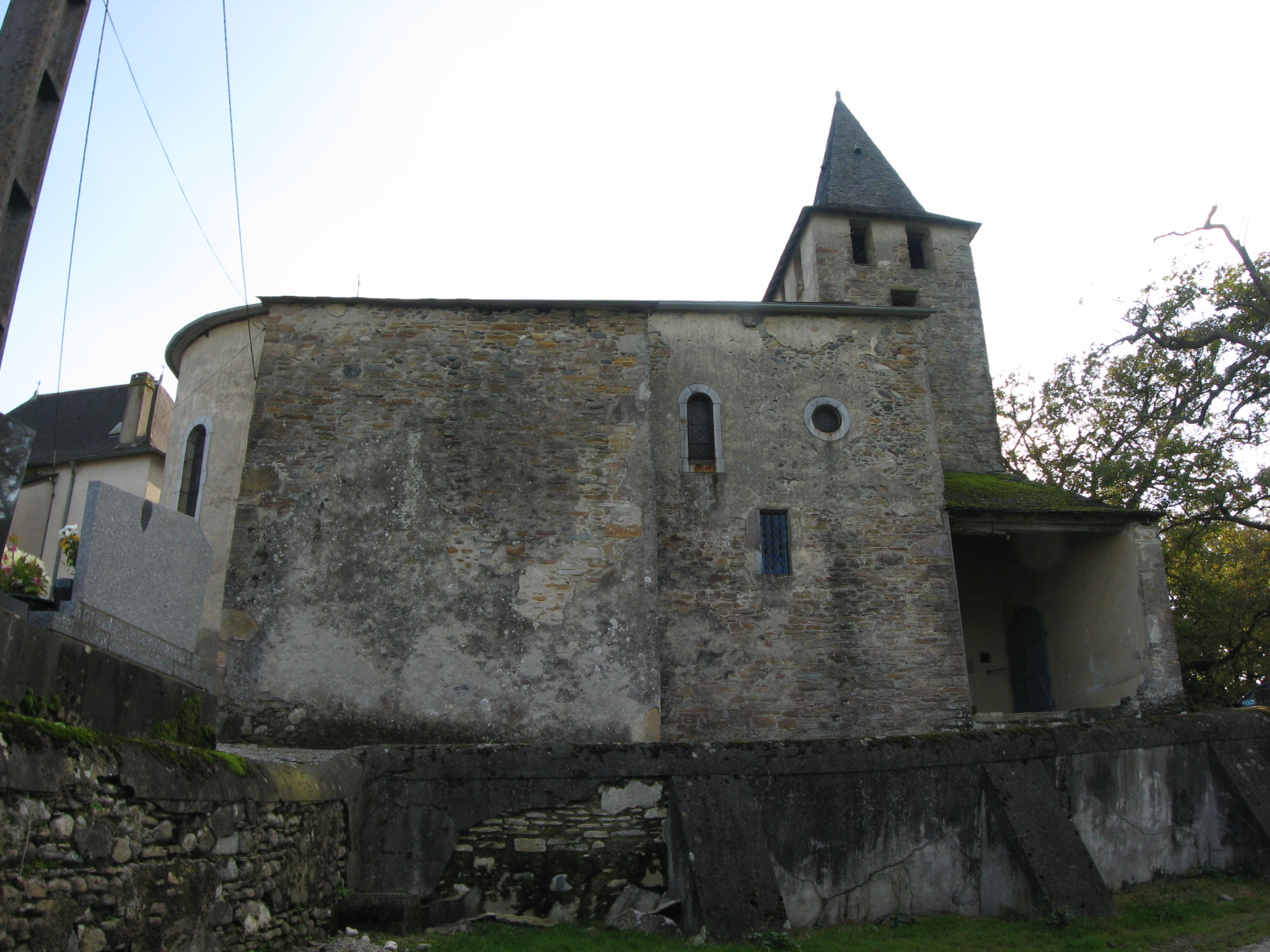 Vue de l'église de Poey-d'Oloron (Pyrénées Atlantiques) Pyrénées).